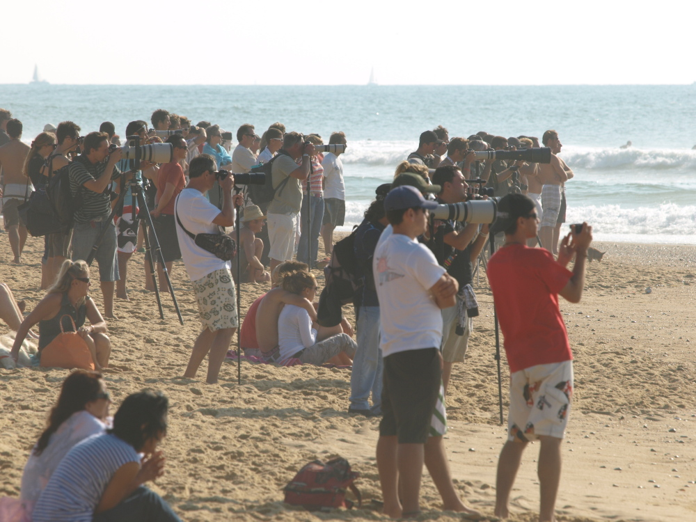 Quicksilver Pro France 2008, Hossegor, France